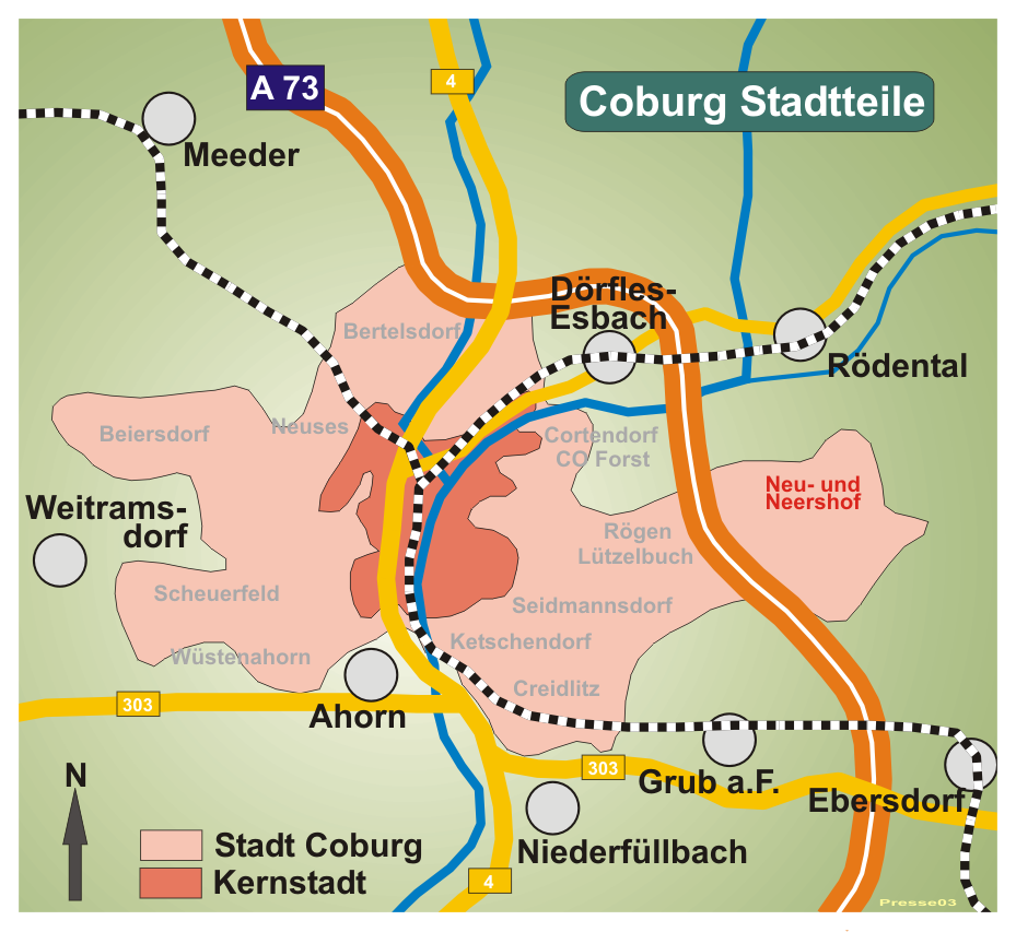 Karte von Coburg, Stadtteil Neu- und Neershof